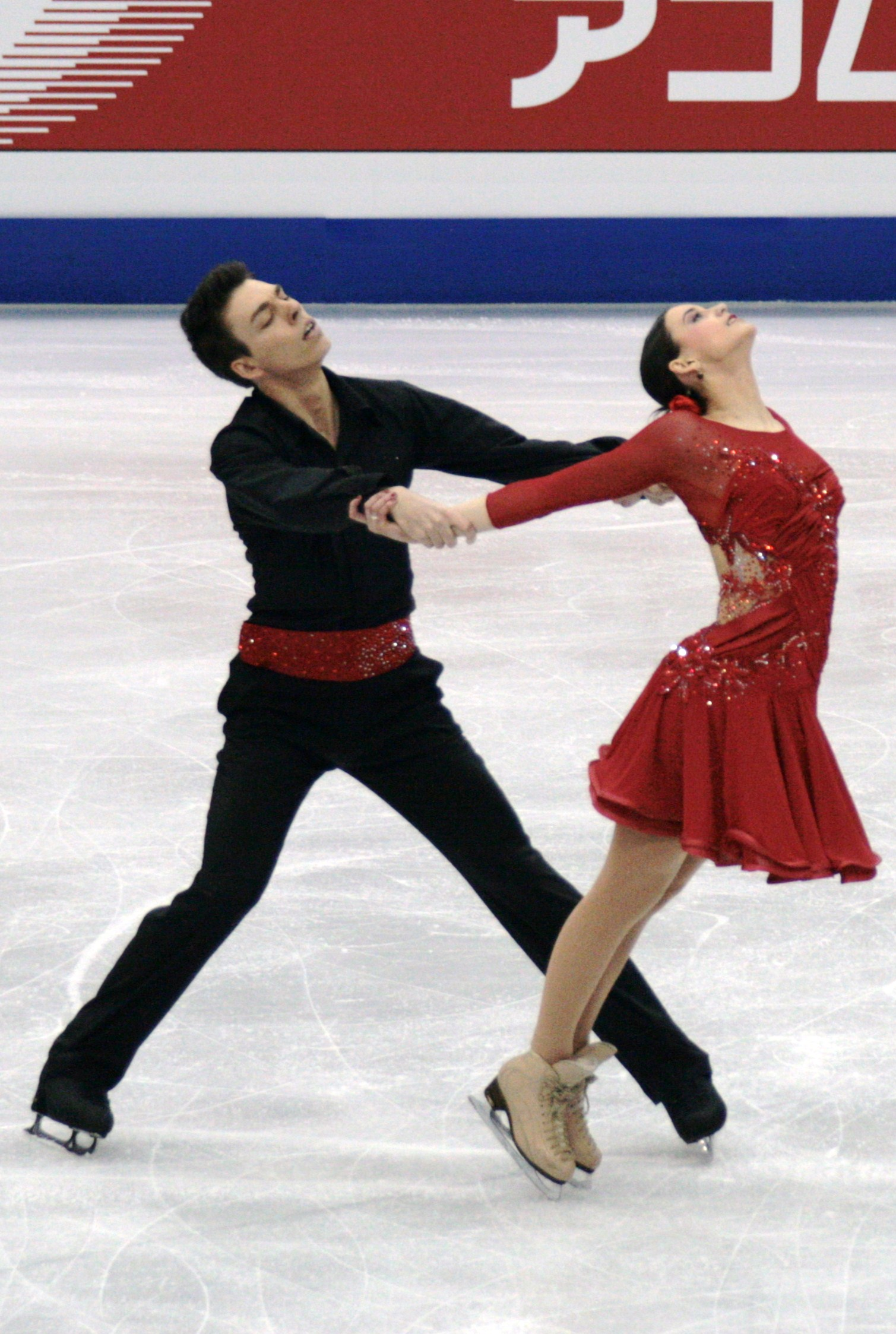 Федерика Теста и Лукаш Цсолей (Словакия) на чемпионате мира по фигурному катанию 2012,предварительный раунд.